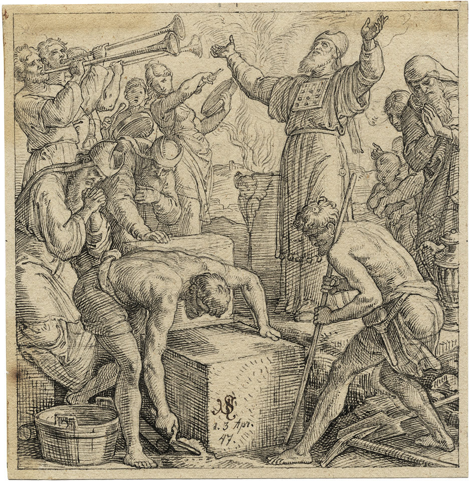 Der Wiederaufbau des Tempels zu Jerusalem unter Esra und Nehemia. Feder in Schwarz über Spuren von Bleistift auf Velin. 14,8 x 14,3 cm. In brauner Feder monogrammiert "JSC" und mit schwarzer Feder datiert "d. 3 Apr. 47".